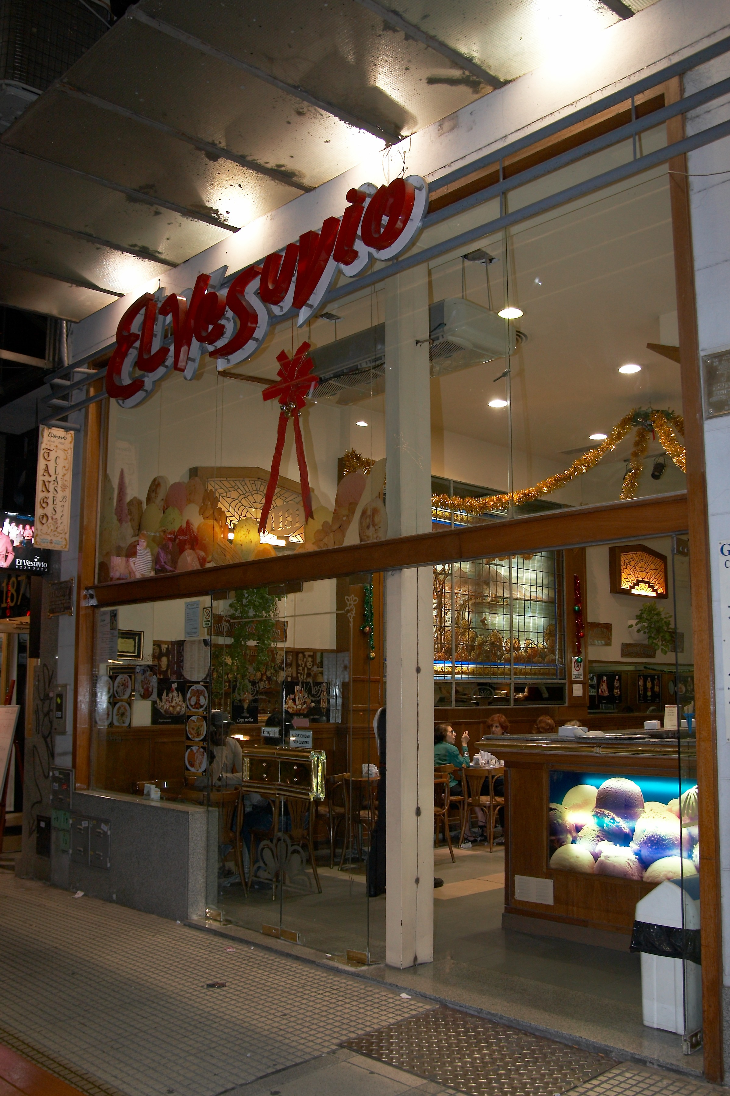 Heladería El Vesuvio. Inaugurada en 1902 es la heladería más antigua de la ciudad. Avenida Corrientes 1181, barrio de San Nicolás, Buenos Aires, Argentina.